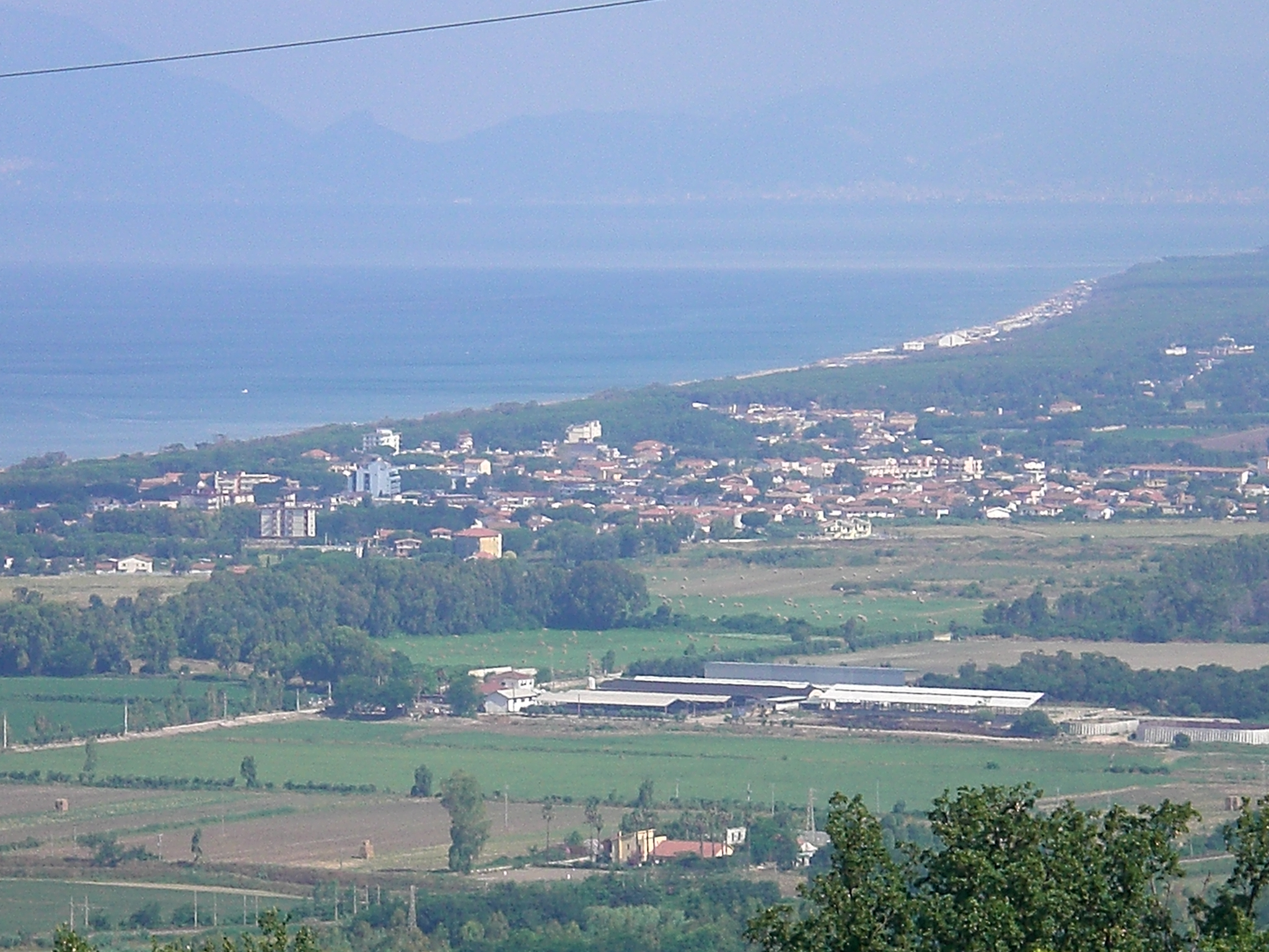 Santa Venere vista dalle colline di Agropoli